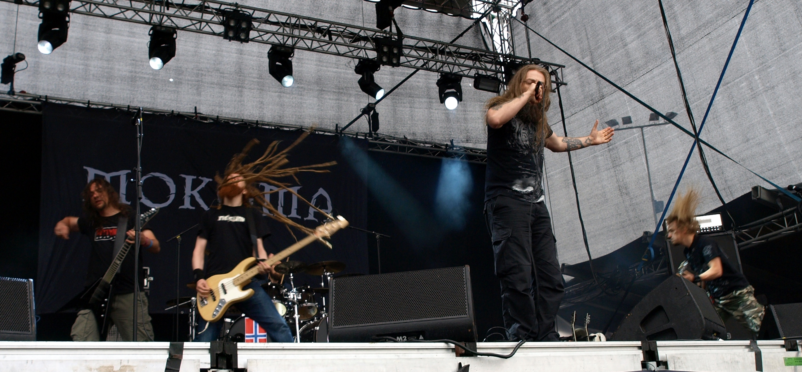 Mokoma live am Myötätuulirock 2011